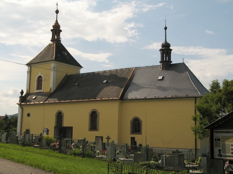 Kostel svaté Kateřiny, Písečná (okres Ústí nad Orlicí).